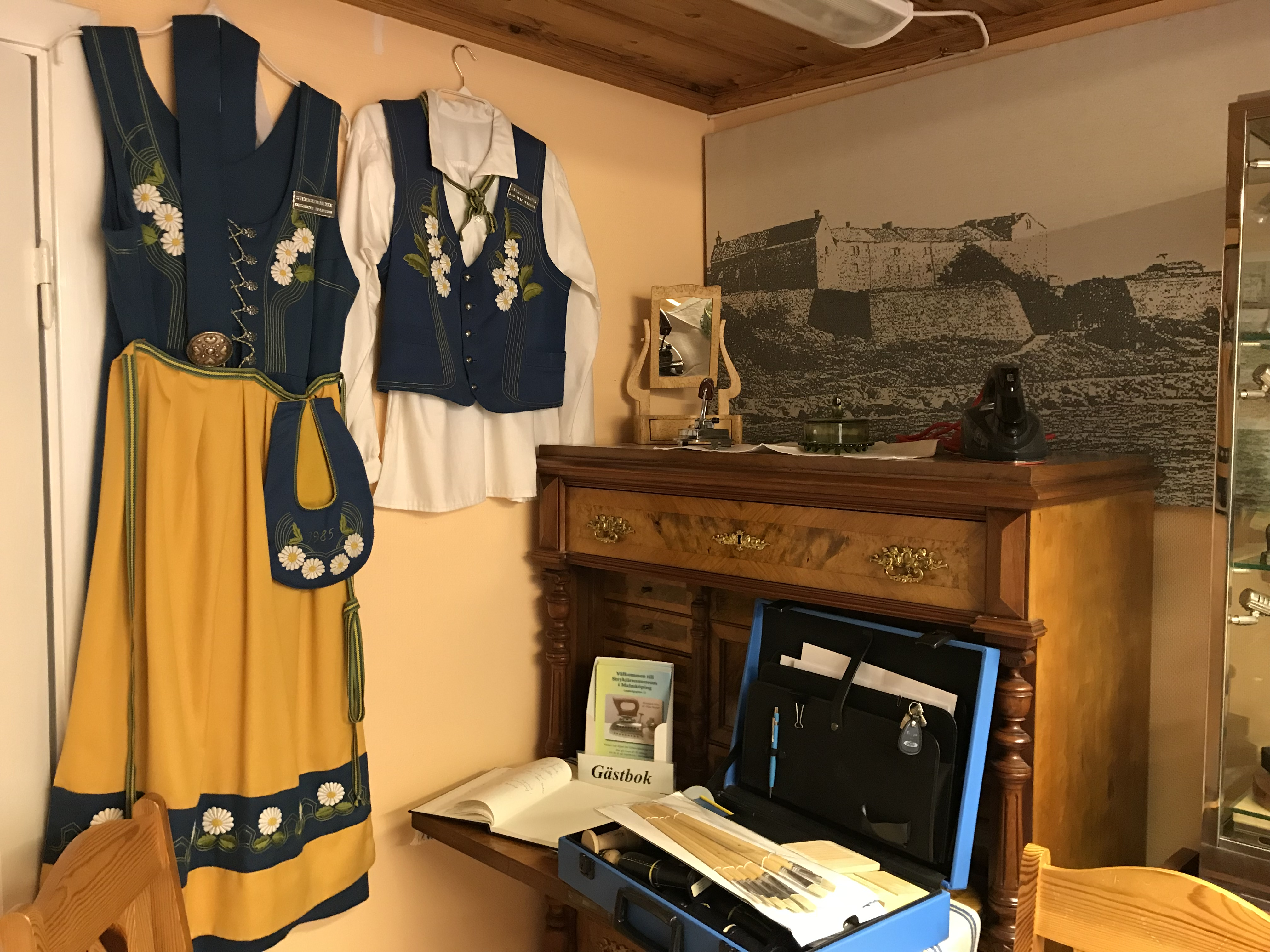 Sverigedräkter HB i Malmköping sydde sverigedräkter 1984-2009. På bilden innehavarna Elisabeth och Karl-Ivar Ivarssons dräkter från 1985 utställda i Sverigedräkter HBːs tidigare affärslokal, där sonen Lars Ivarsson 2014 startade Strykjärnsmuseum i Malmköping.